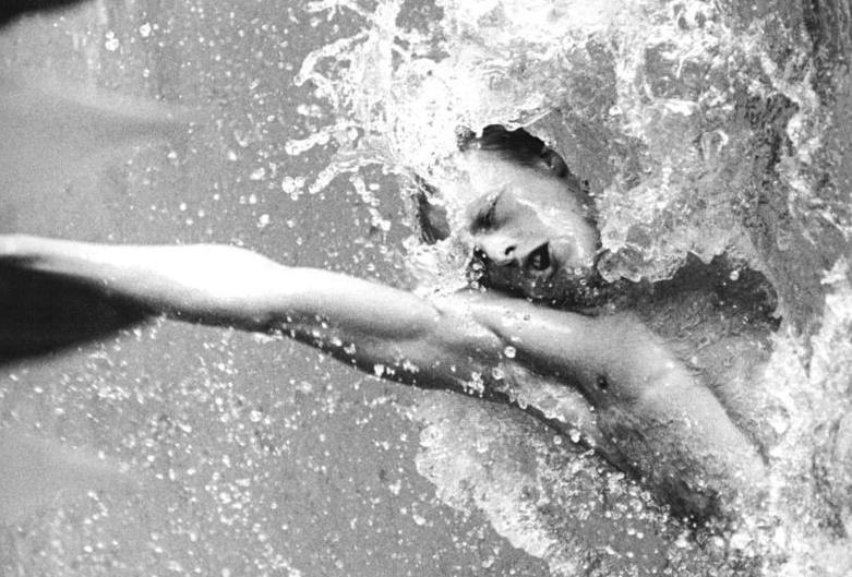 Frank Baltrusch ADN-ZB Kluge 16.6.83 Gera: 34. DDR-Meisterschaften im Sportschwimmen- 2. Tag- Im Finale über 200m Rücken der Herren konnte Farnk Baltrusch (SC Magdeburg) seinen Vorjahreserfolg widerholen. Mit der Siegerzeit von 2:01,47 min stellte er seinen eigenen DDR-Rekord ein.